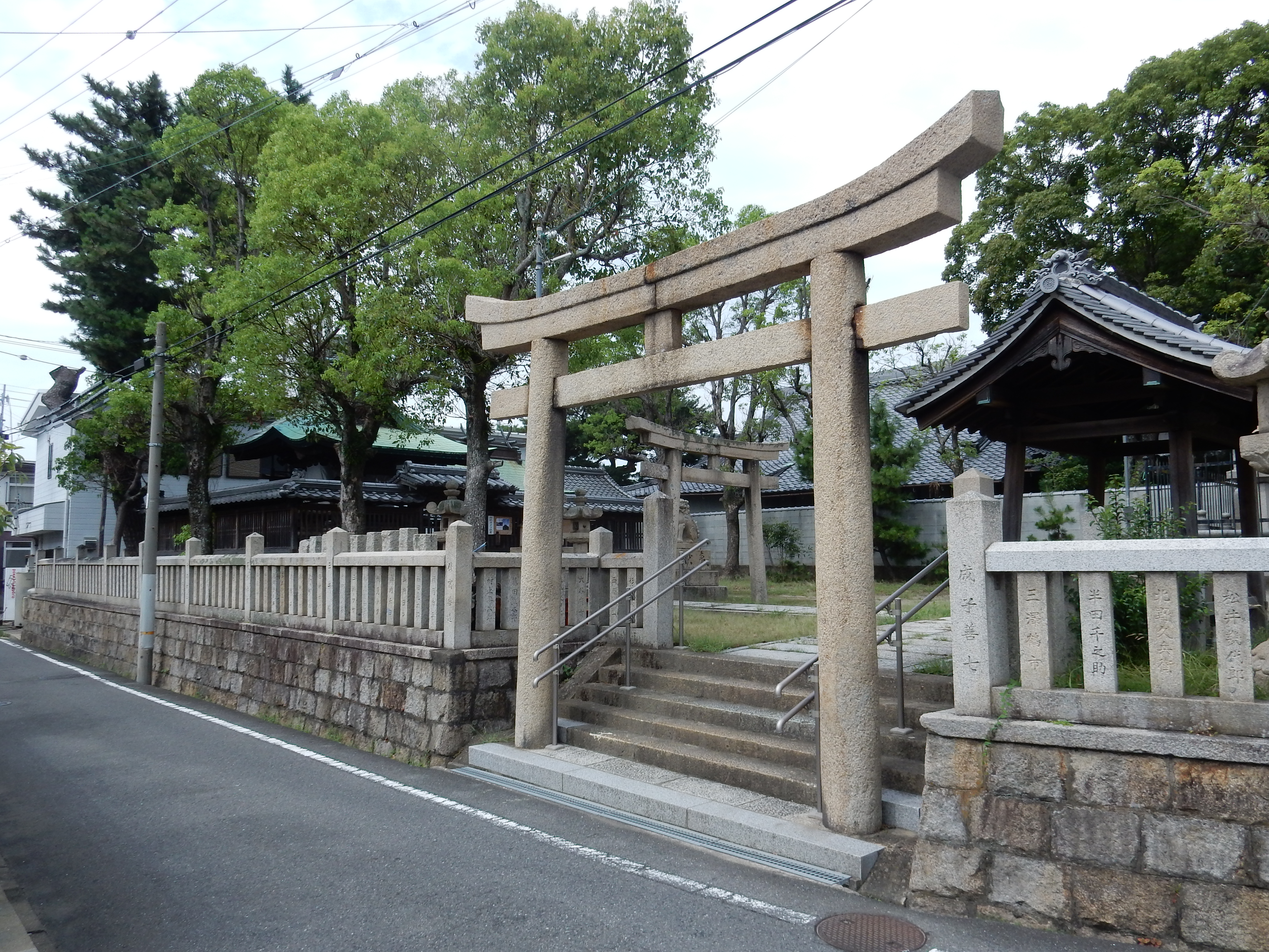 大阪府阪南市にある尾崎神社（全景）